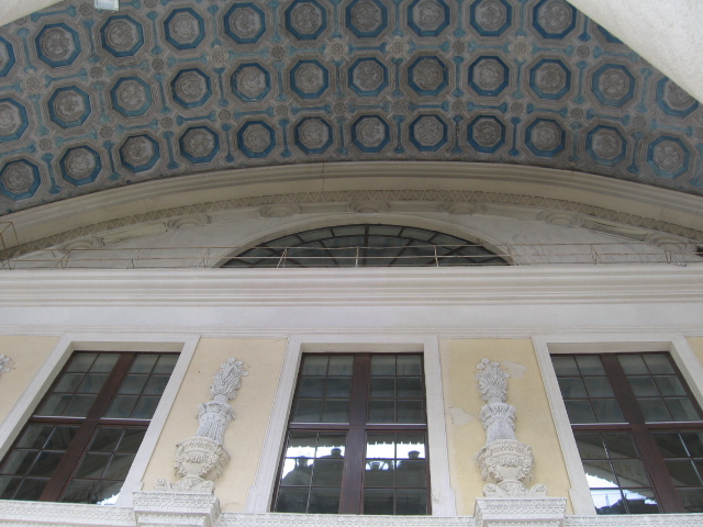 Минск, ДК Профсоюзоф. Арка